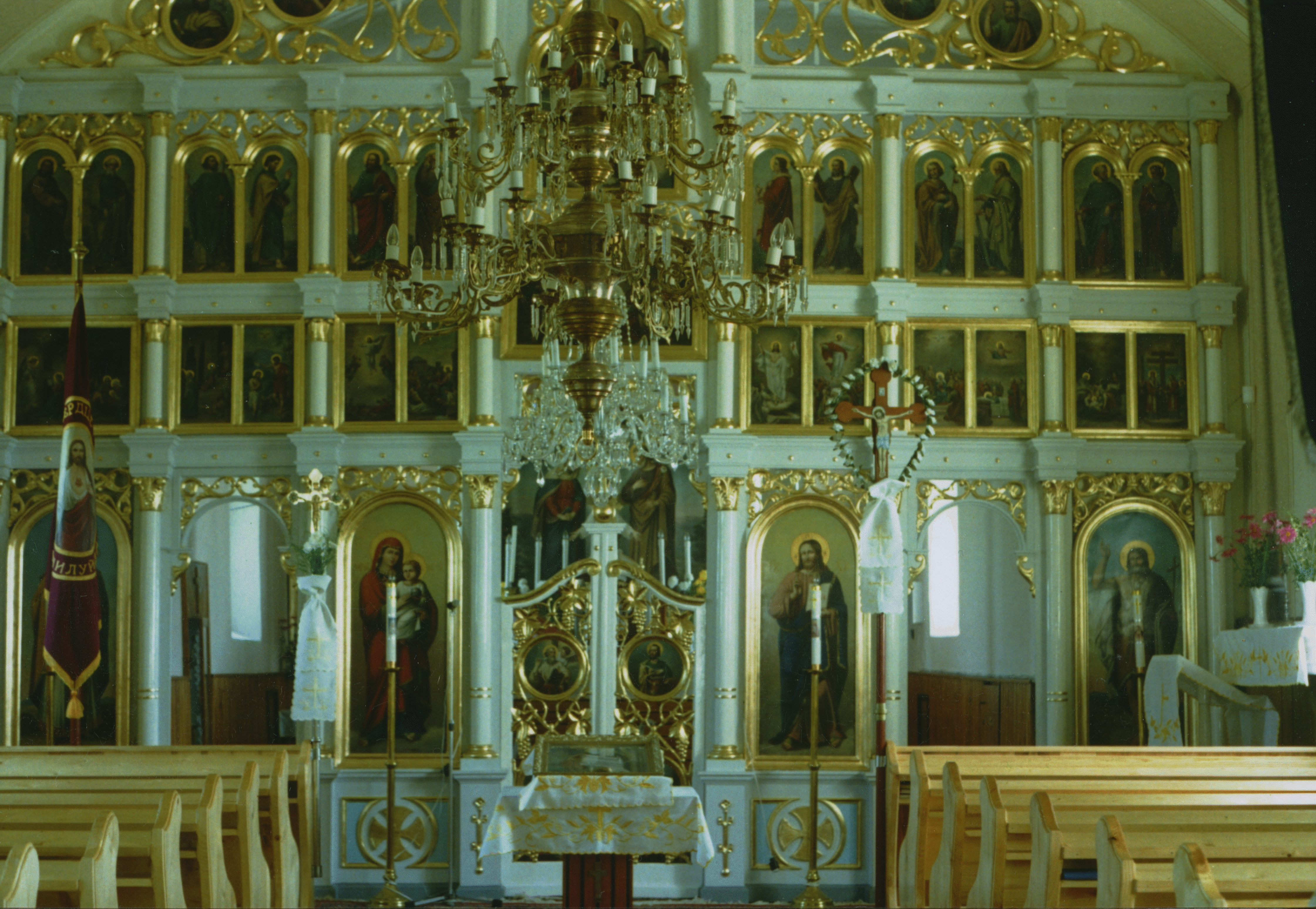 Ikonostas v gréckokatolíckej cerkvi v Krásnom Brode, fotografia z r. 1996. Photo taken by Jozafát Vladimír Timkovič, OSBM